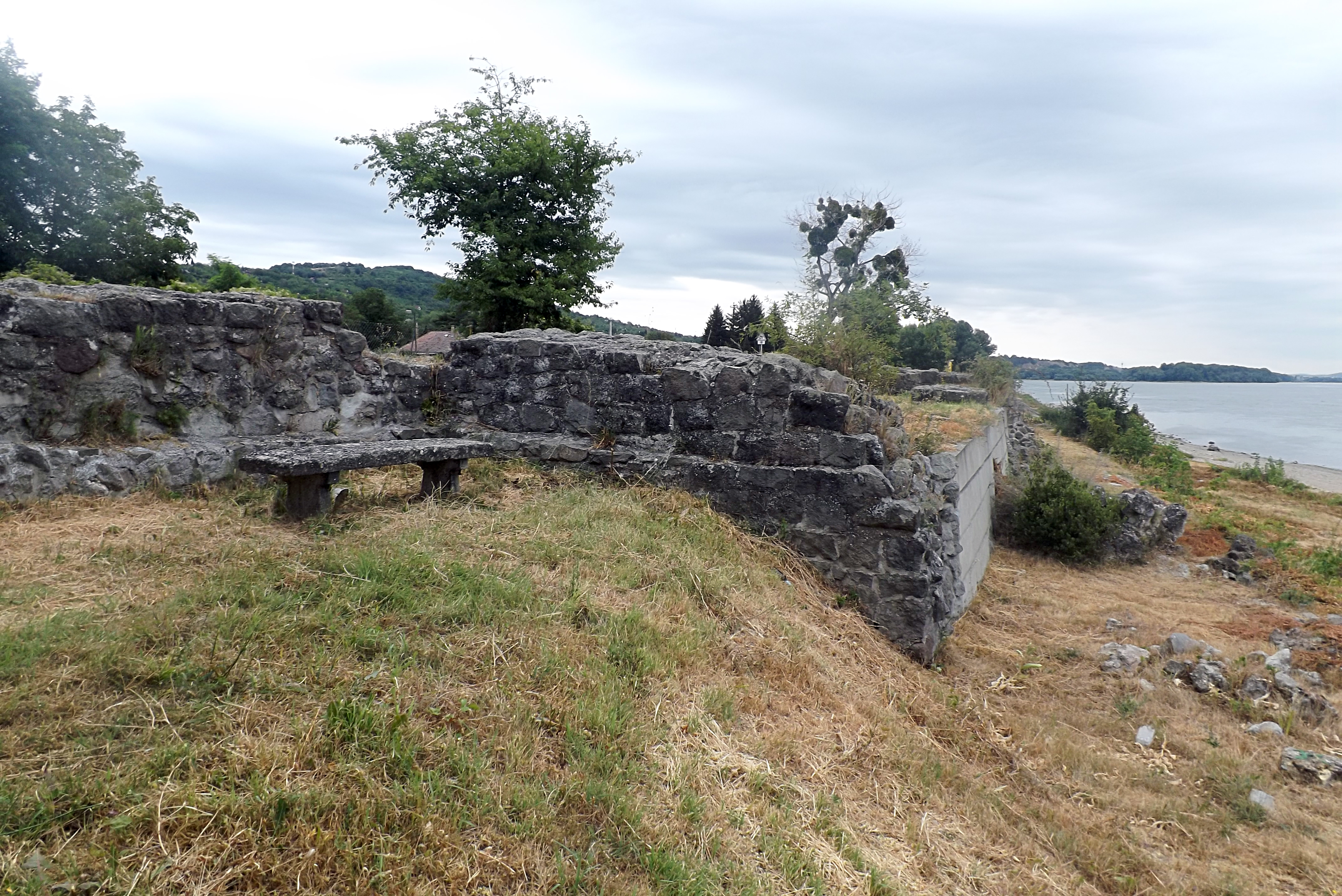 Késő római kori hídfőállás romjai Verőcén